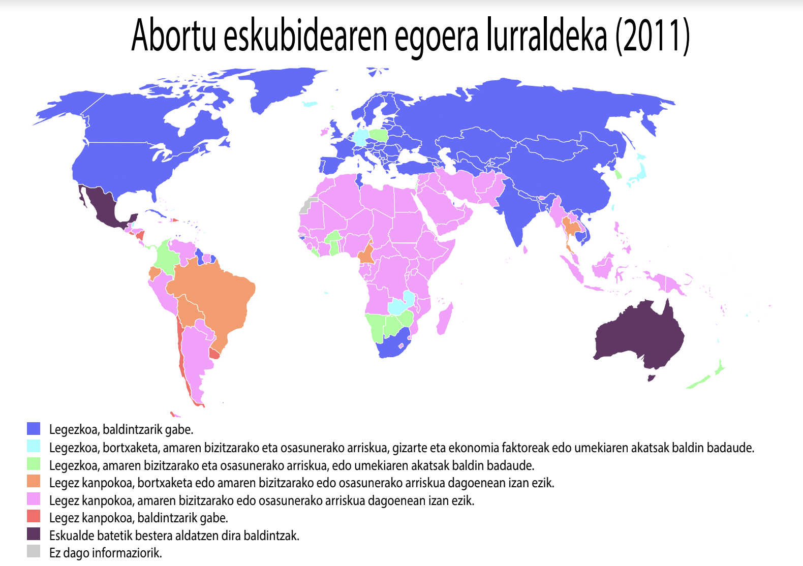 Munduan abortuaren legeztatzea.